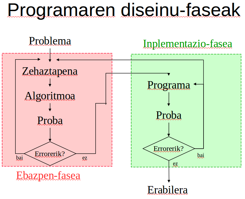 Konputagailu-programa bat sortzeko faseak (ebazpen-faseea eta inplementazio-fasea)